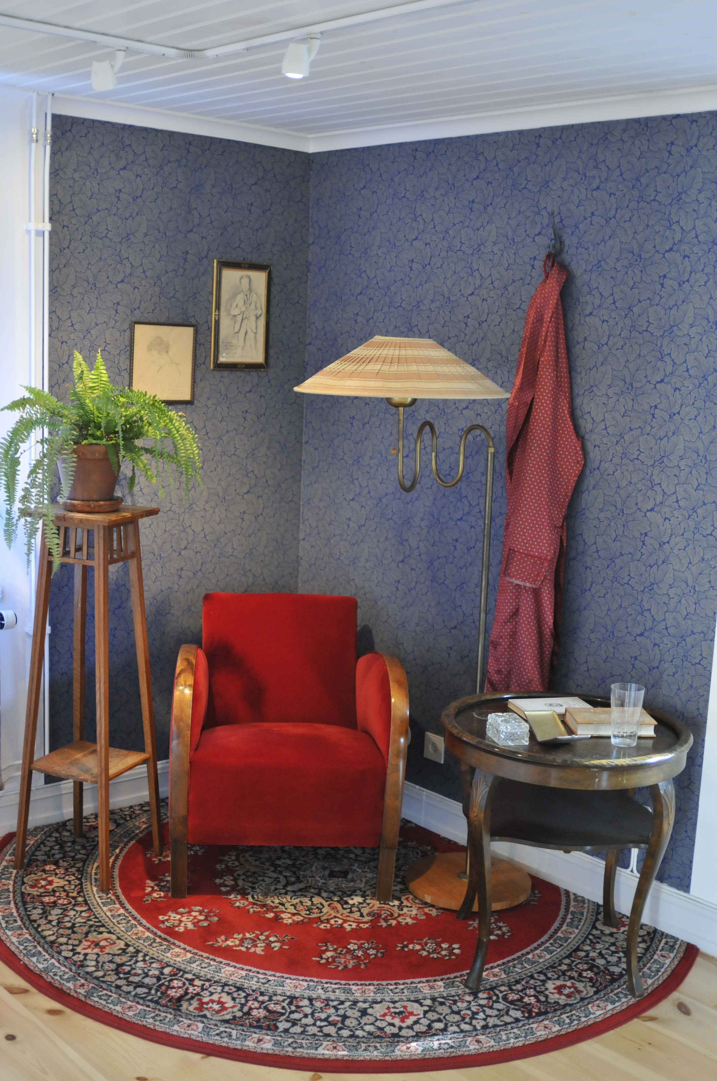 Interiörbild från Hjalmar Bergmansmuseét i Wadköping Örebro.